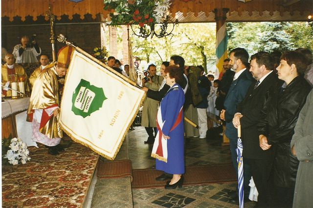 Poświecenie sztandaru KSS